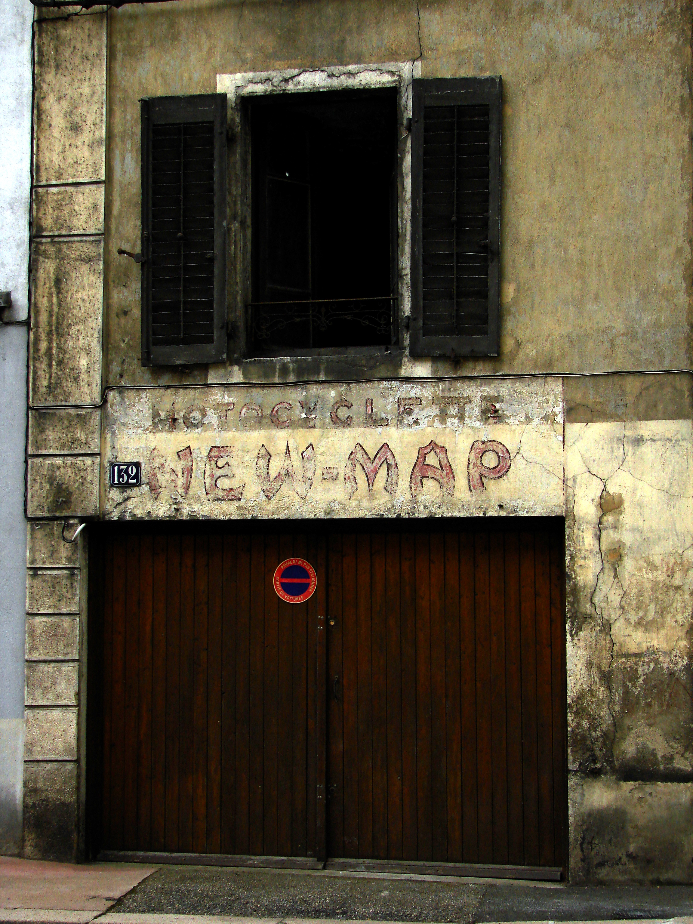 132 rue du Docteur Michel-Temporal